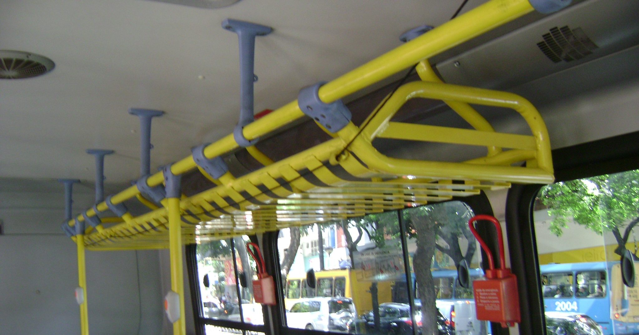 Porta-bagagem em ônibus de Belo Horizonte, Brasil.